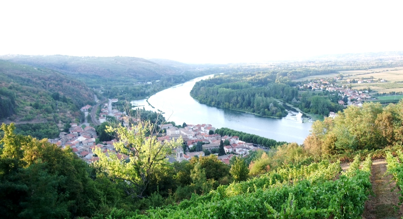 Serrières (Ardèche) détail